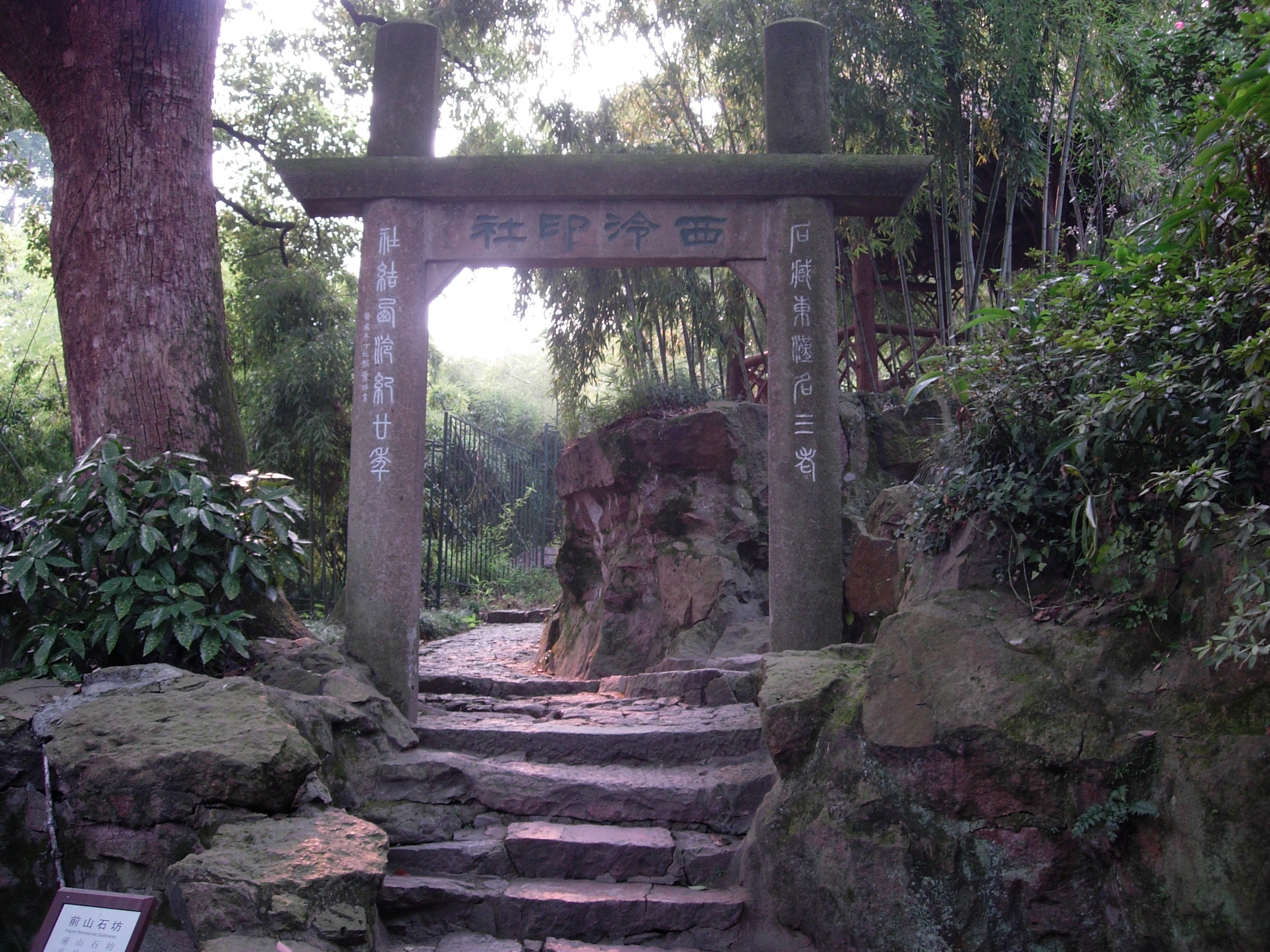 西泠印社，2006年暑假摄于杭州西湖